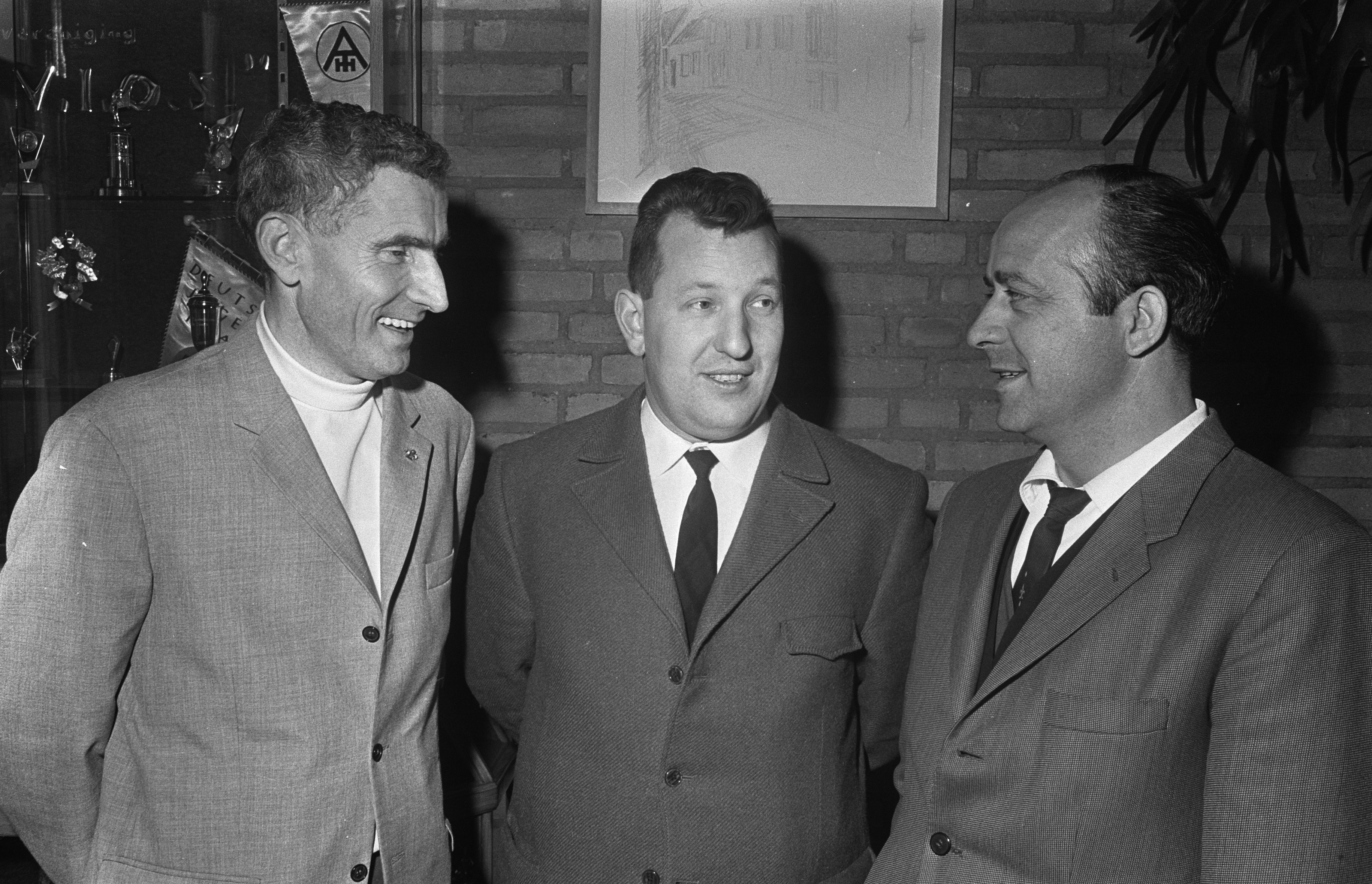 Collectie / Archief : Fotocollectie Anefo Reportage / Serie : [ onbekend ] Beschrijving : Biljarten in Amersfoort, vele groten v.l.n.r. Tini Wijnen, Raymond Ceulemans (België), Jose Galvez (Spanje) Datum : 14 november 1968 Locatie : Amersfoort Trefwoorden : biljarten, groepsportretten Persoonsnaam : Ceulemans, Raymond, Galvez, Jose, Wijnen, Tini Fotograaf : Koch, Eric / Anefo, [onbekend] Auteursrechthebbende : Nationaal Archief Materiaalsoort : Negatief (zwart/wit) Nummer archiefinventaris : bekijk toegang 2.24.01.05 Bestanddeelnummer : 921-8572